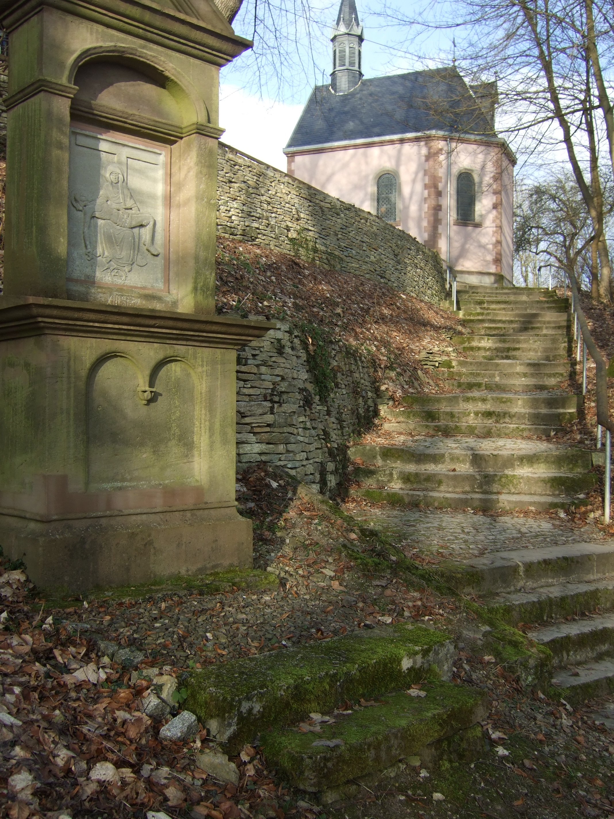 Bonifatiuskapelle, Wallfahrtsstätte Hülfensberg/Eichstatt